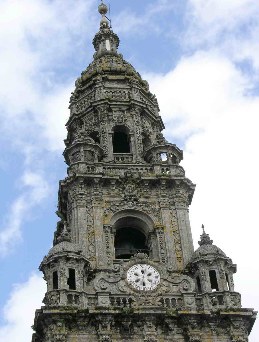 Santiago de Compostela - Galicia - España (Spain)